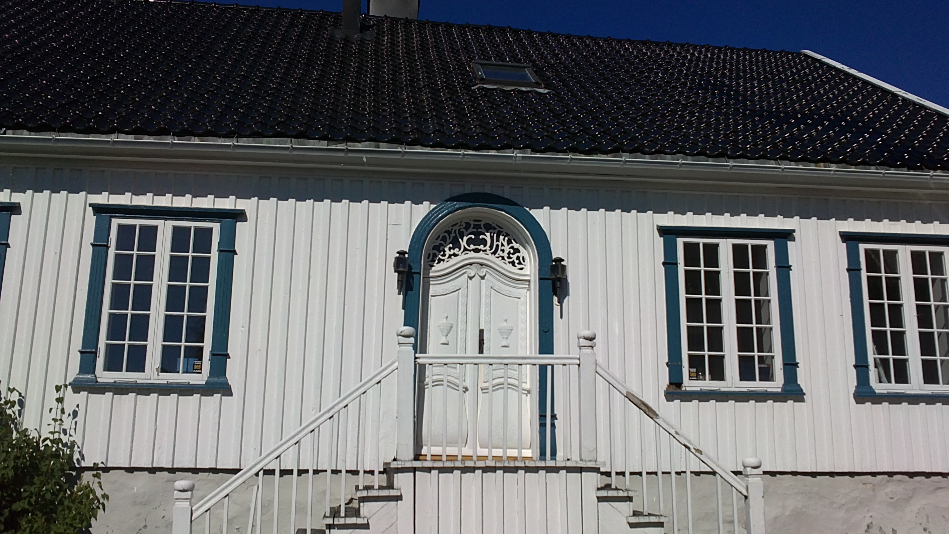 Bilde av Steingagta 7